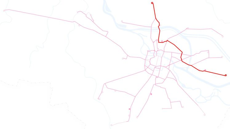 Poglądowa mapka przebiegu linii tramwajowej 1 we Wrocławiu.